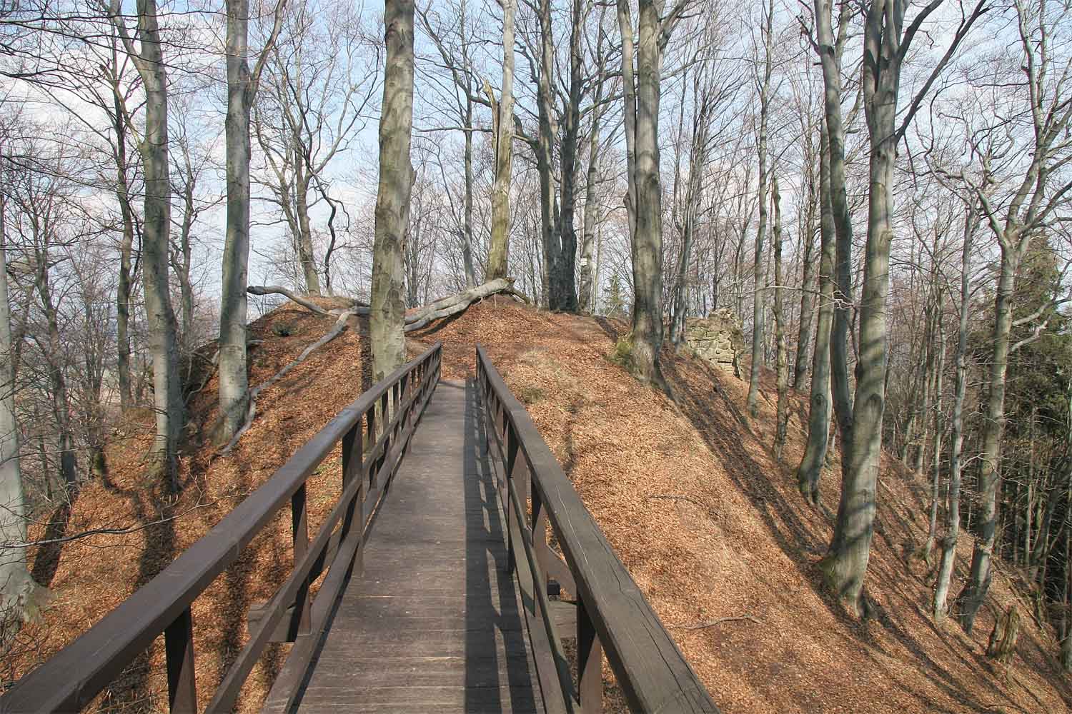 Zřícenina hradu Žampach - Hradní jádro autor:Zp